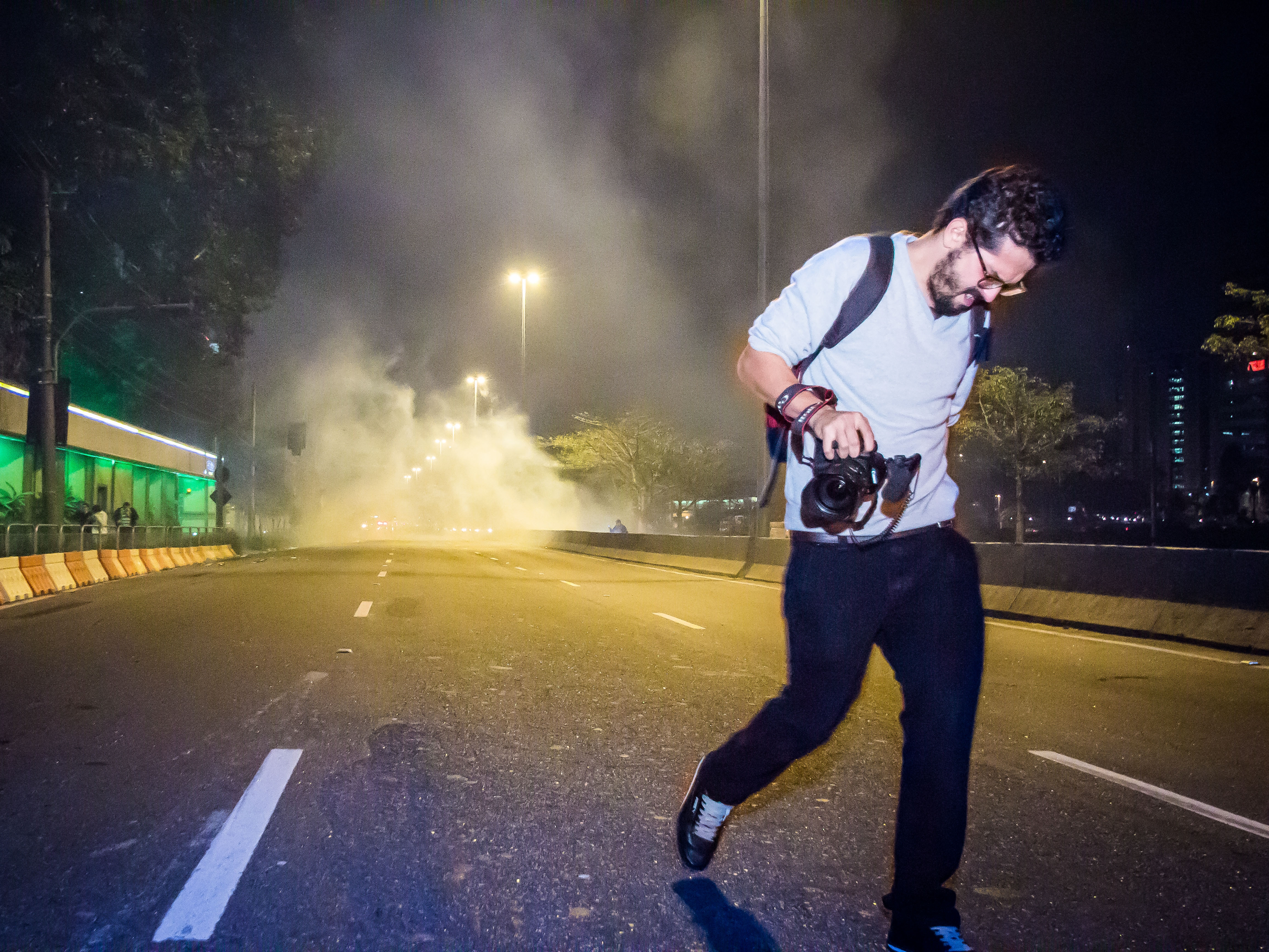 Fotógrafo fugindo de bombas de gás lacrimogênio lançadas pela Polícia Militar de São Paulo durante os protestos de junho de 2013, em São Paulo.